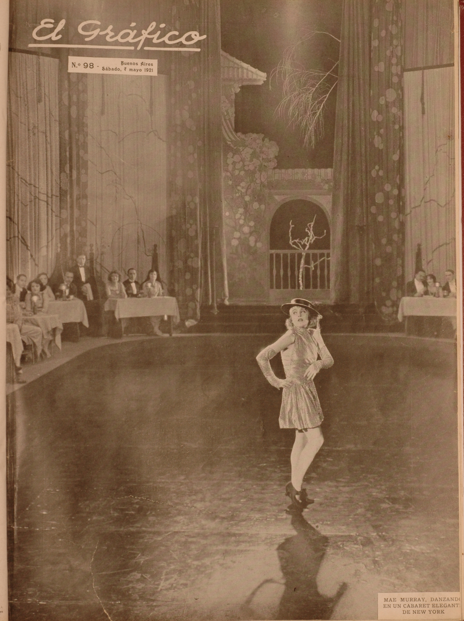 El Grafico del 07 de Mayo de 1921. Edicion 98